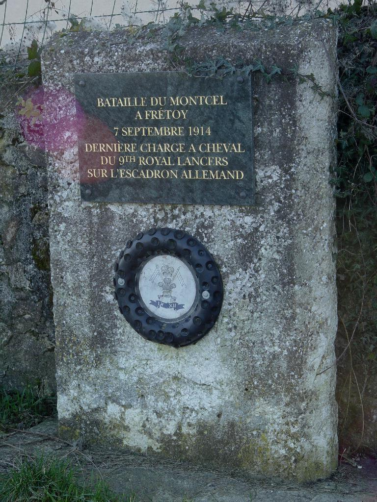 Plaque à Frétoy : 0802_16_9th Royal Lancers